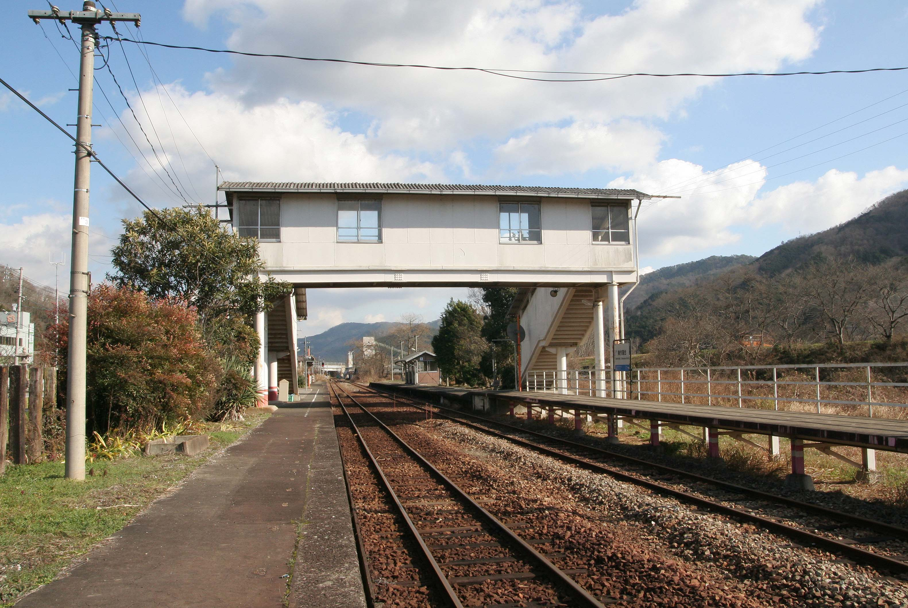 美作落合駅の構内